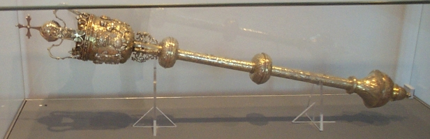 Жезл Лондонского королевского общества Royal Society mace, granted by Charles II. Copyright © 2004 Kaihsu Tai. Permission is granted to copy, distribute and/or modify this document under the terms of the GNU Free Documentation License, Version 1.2 or any later version published by the Free Software Foundation; with no Invariant Sections, no Front-Cover Texts, and no Back-Cover Texts. A copy of the license is included in the section entitled "Text of the GNU Free Documentation License". Subject to disclaimers.